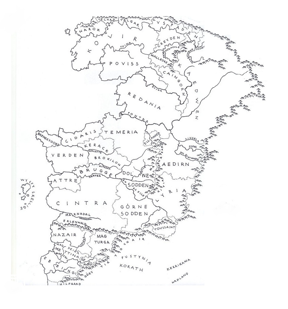 Mapa Kontynentu - synteza konceptow autorow popularnych map, wzbogacona o wnioski wysnute z lektury tekstow Sapkowskiego (gabaryty panstw, lokacje wzgledem siebie, itd.).